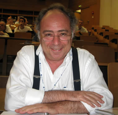 Denis Gratias en 2008 au congrès Quasi-crystals à l'ETH de Zurich